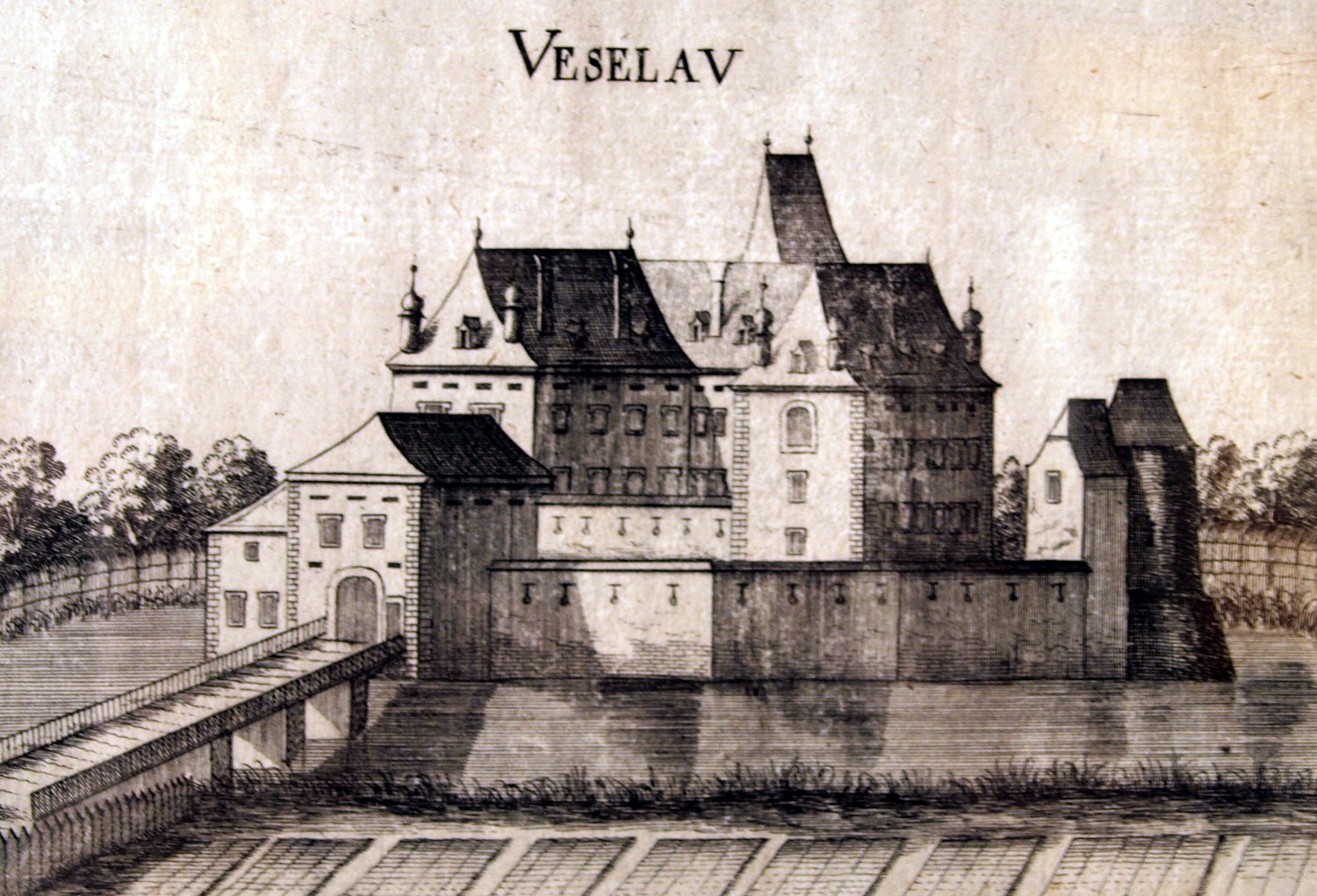 Vischer-Stich von Burg Veselav (alias Vöslau) um 1672